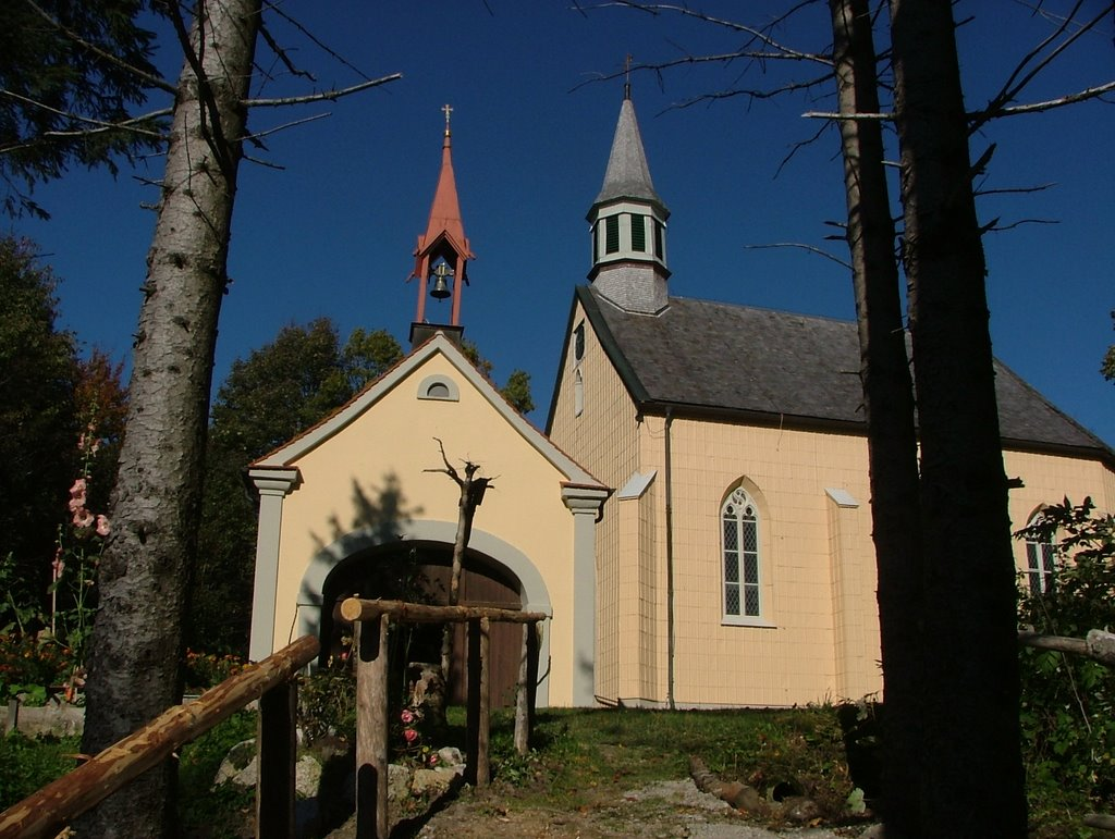 Gschnaidt Wallfahrtskapellen